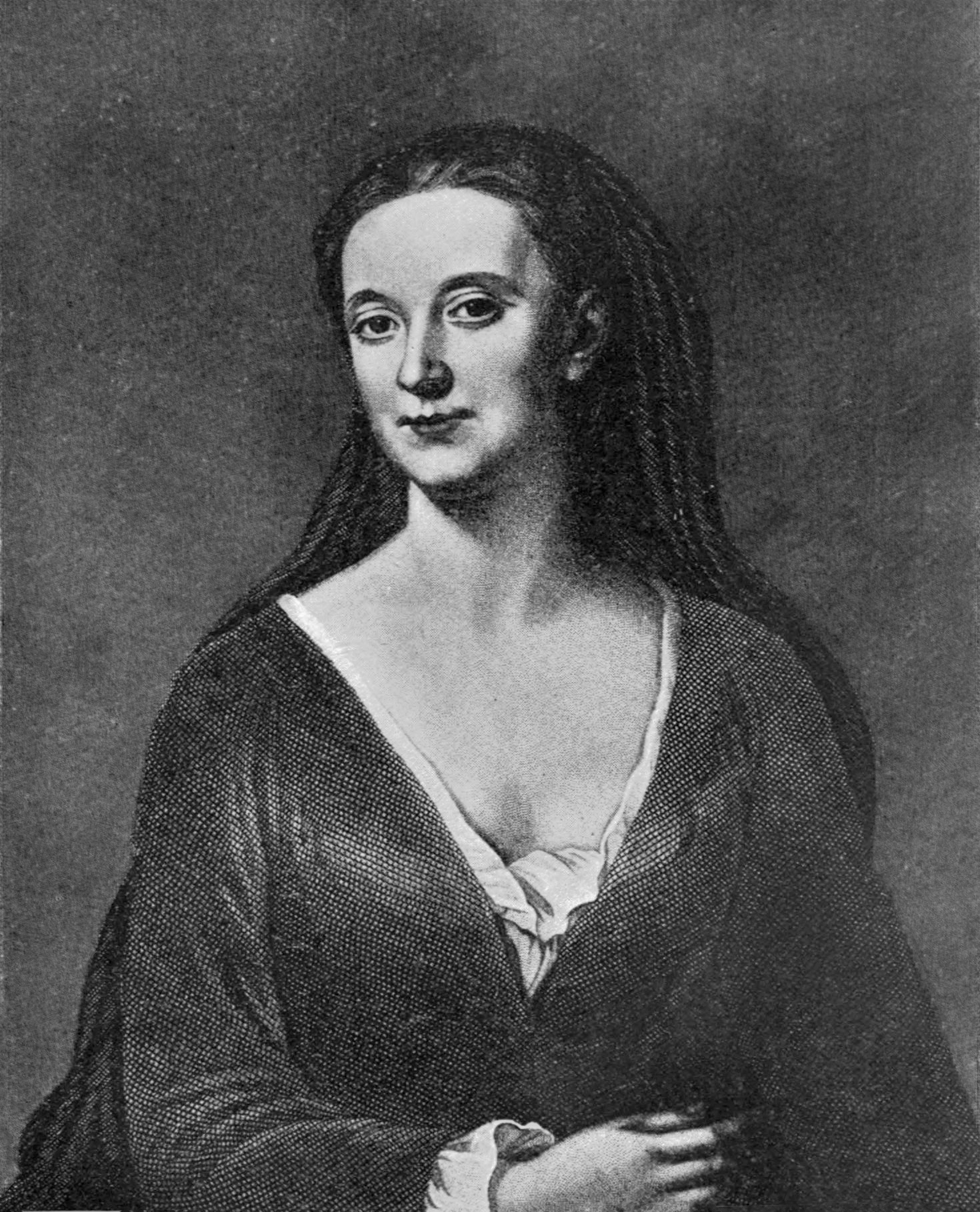 Lady Grisell Baillie (1665–1746)